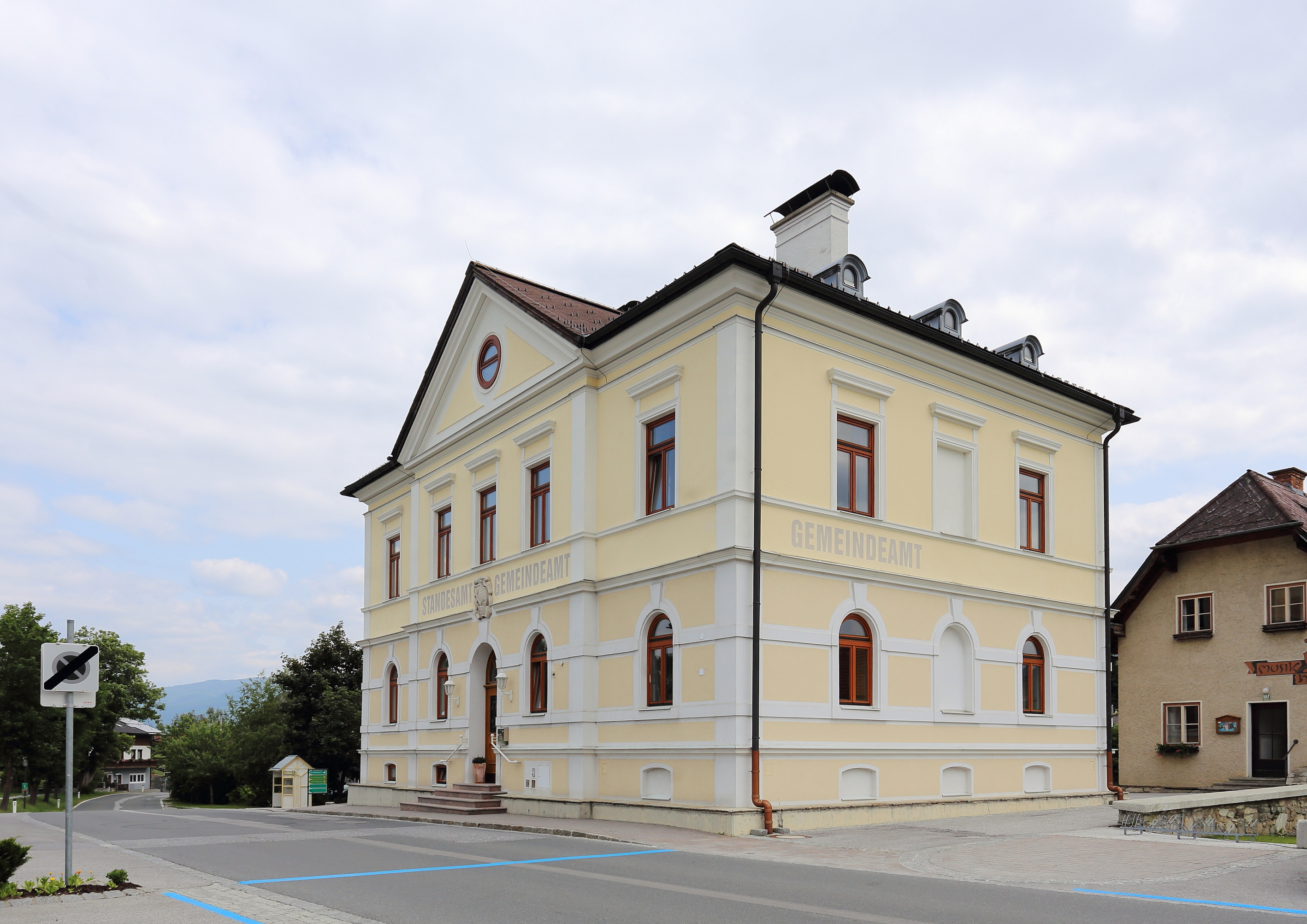 Rathaus der Salzburger Gemeinde Mariapfarr.